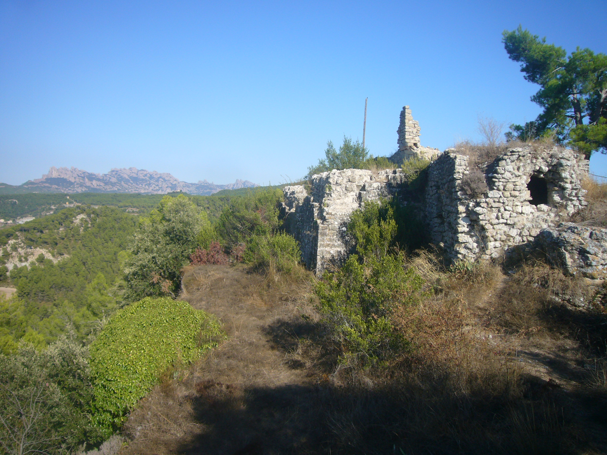 Castell de Castellolí. Vist des de l'extrem oest del castell, amb la muntanya de Montserrat al fons.